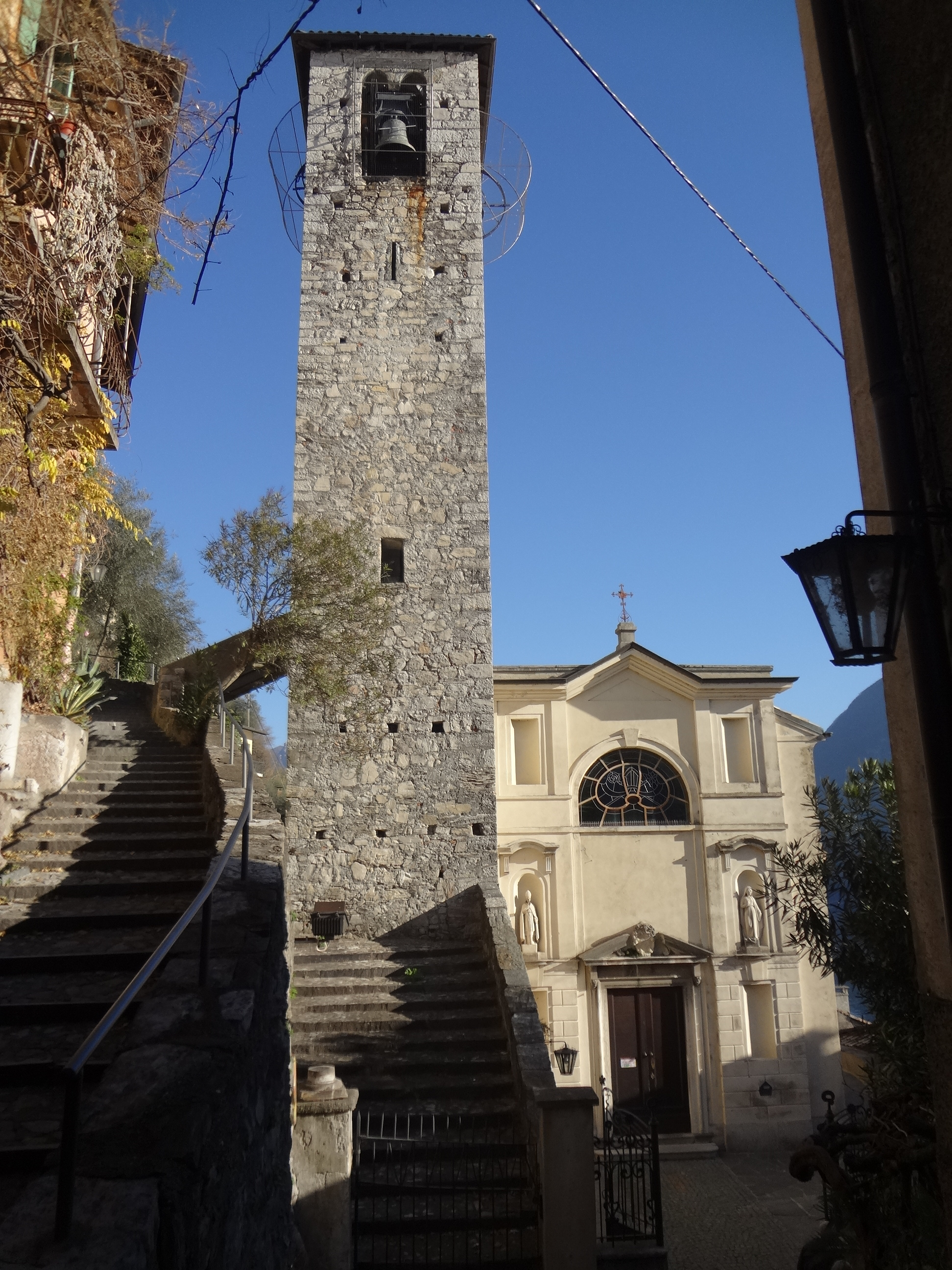 Église de San Vigilio, Gandria, Lugano, canton du Tessin.